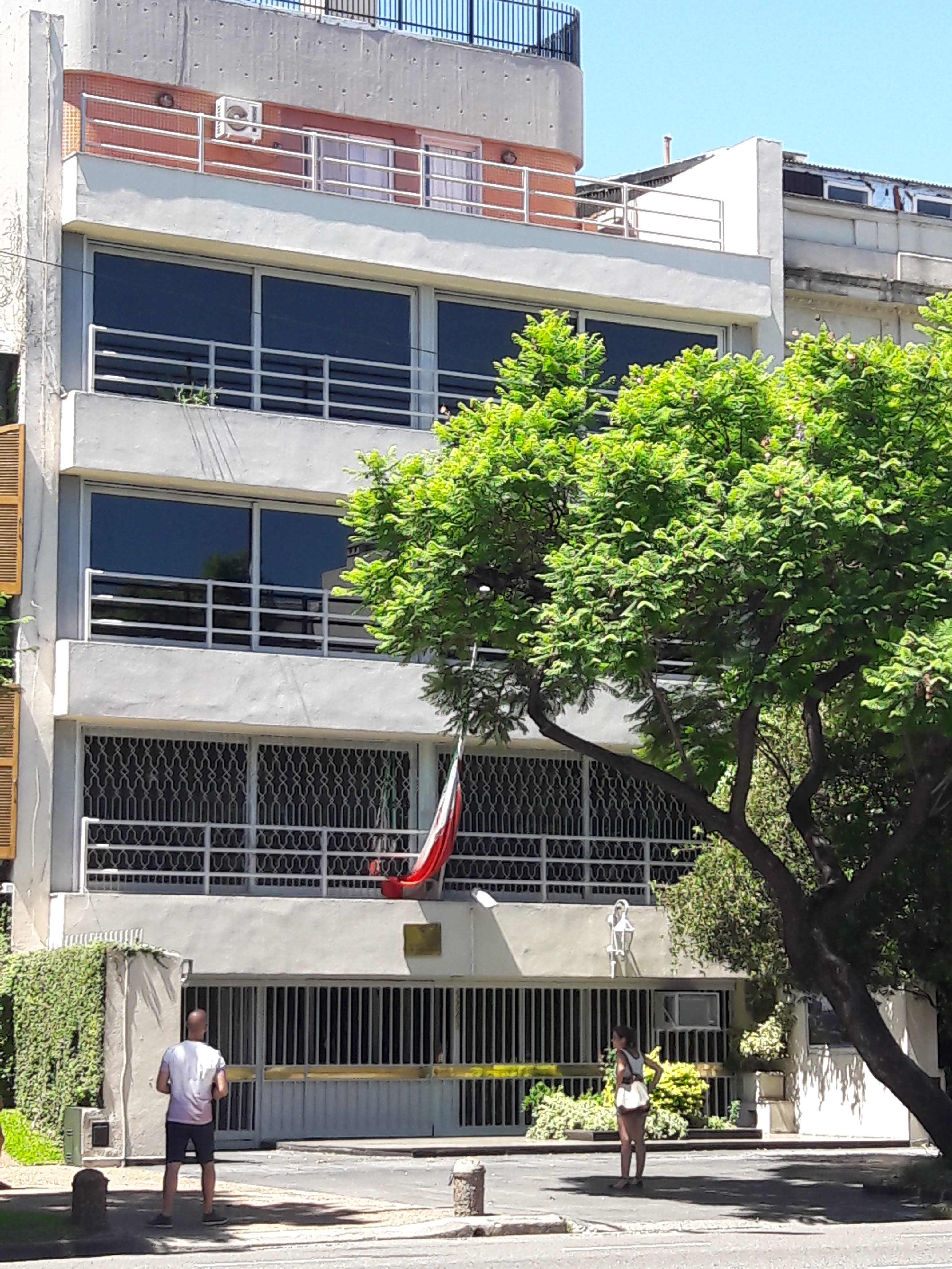 Embajada de Irán, Palermo, Buenos Aires, Argentina.